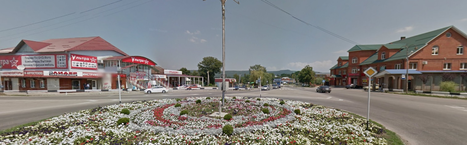 Центр города